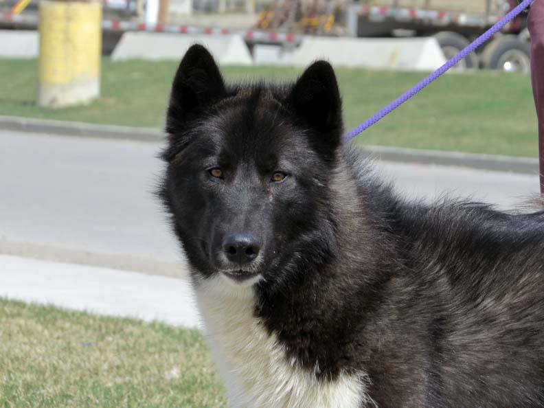 Perro de raza esquimal canadiense, también llamado "Qimmiq".